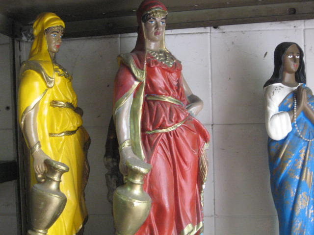 Ciganos, entidades cultuadas na Umbanda.